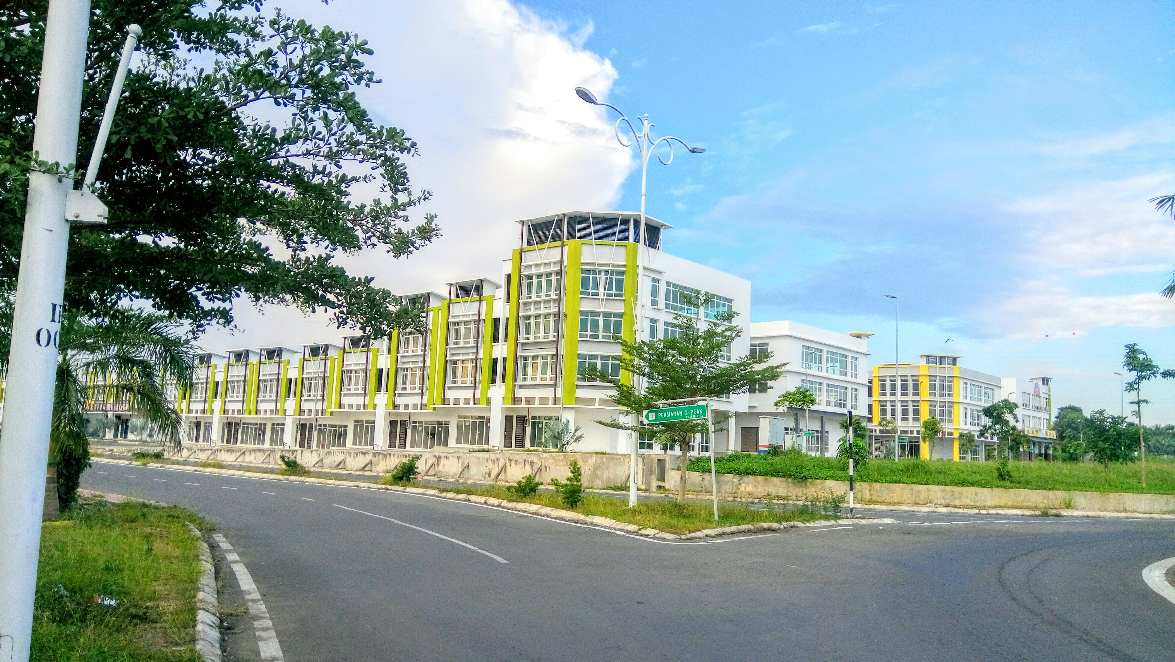 Bandar di Lahad Datu